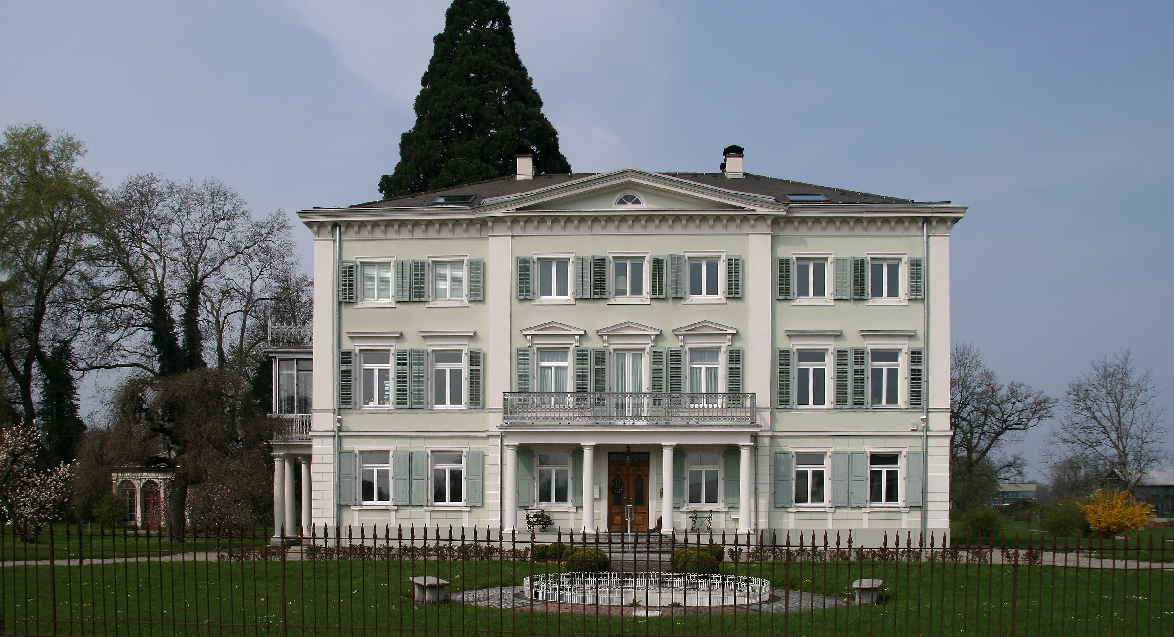 aus dem DEHIO Vorarlberg 1983: Landstraße Nr. 36: Villa, strenghistoristisch, zurückgesetzt in parkartigem Grundstück, 3geschossig mit flachem Walmdach, 7achsig, flacher Mittelrisalit mit Ädikulafenstern im Hauptgeschoß, Balkon mit Gusseisengitter auf toskanischen Säulen (Säulenordnung). *** in Hard, Vorarlberg.